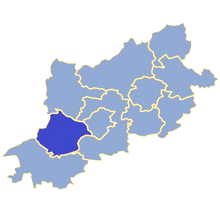 Powiat zielonogórski - Gmina Świdnica